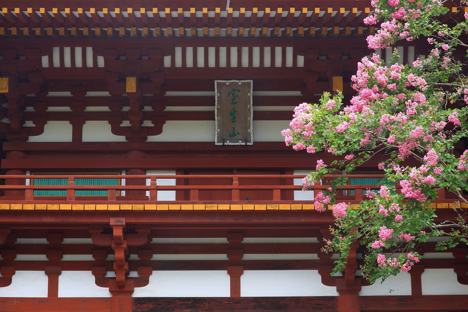 室生寺仁王門（2013年）